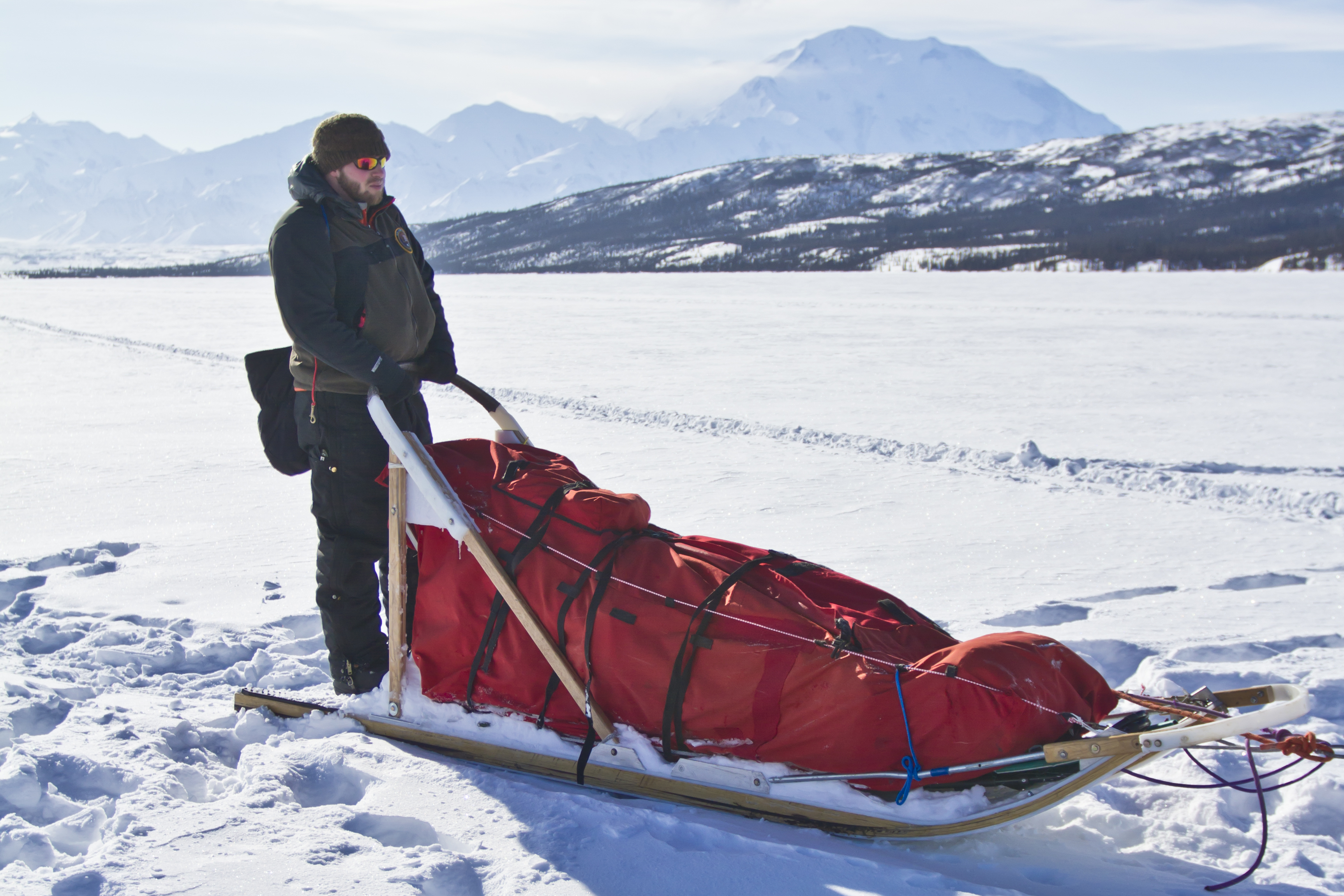 (NPS PHOTO / JACOB W. FRANK)